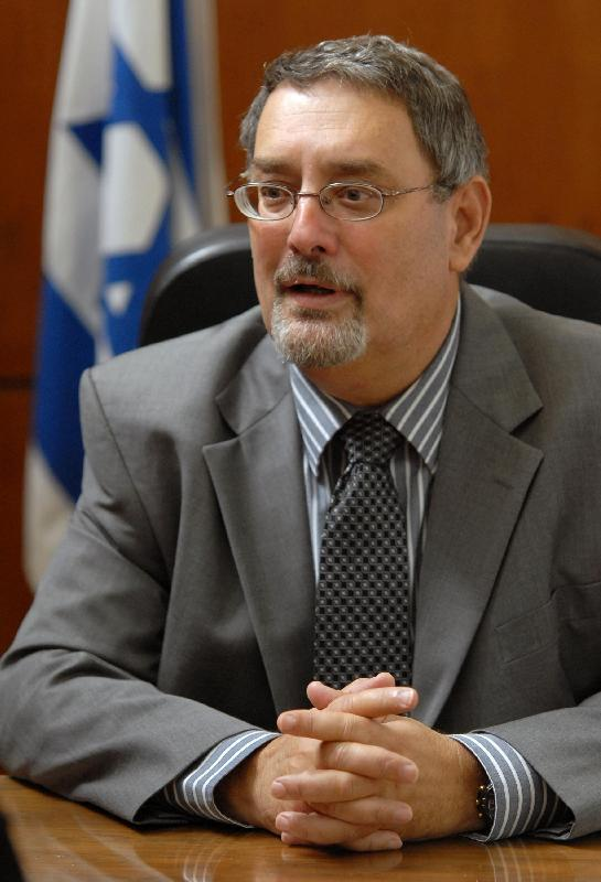 Brasília - O embaixador de Israel no Brasil, Giora Acher, fala com a Agência Brasil sobre o conflito na Faixa de Gaza Foto: Fabio Rodrigues Pozzebom/ABr